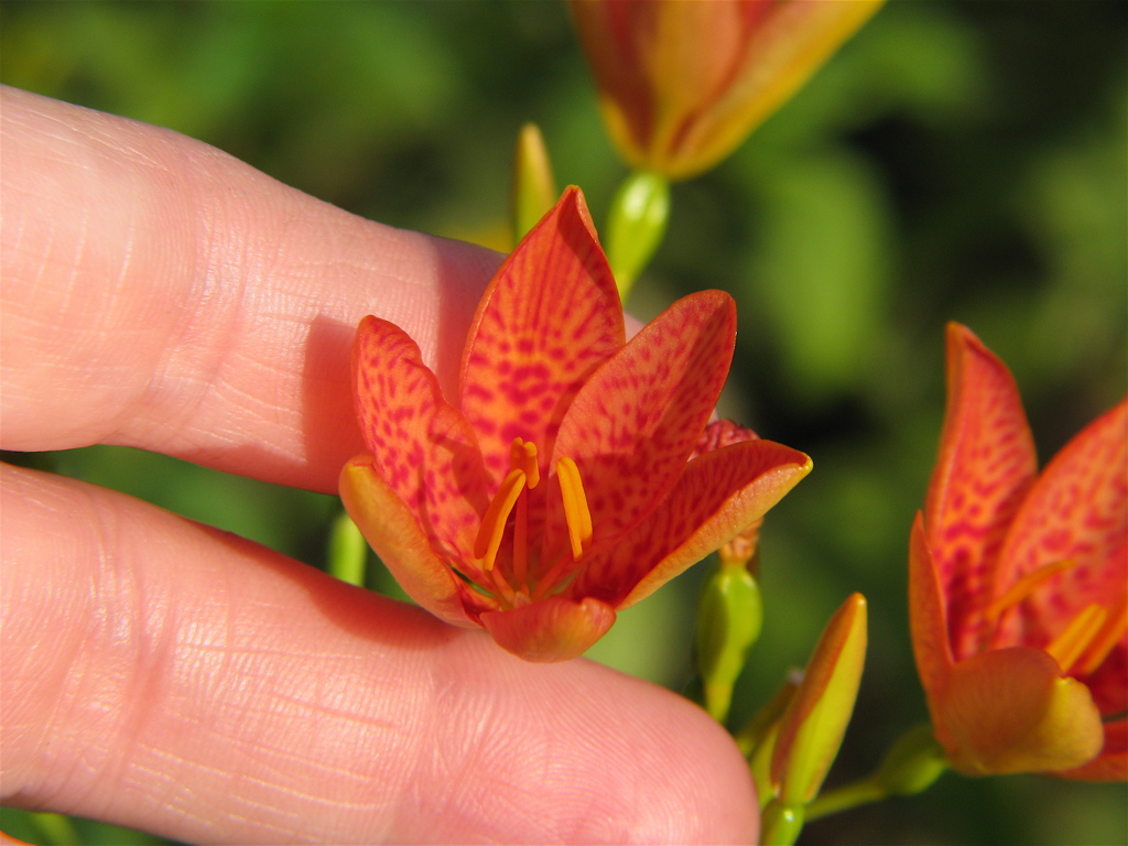 Flower In Fingers